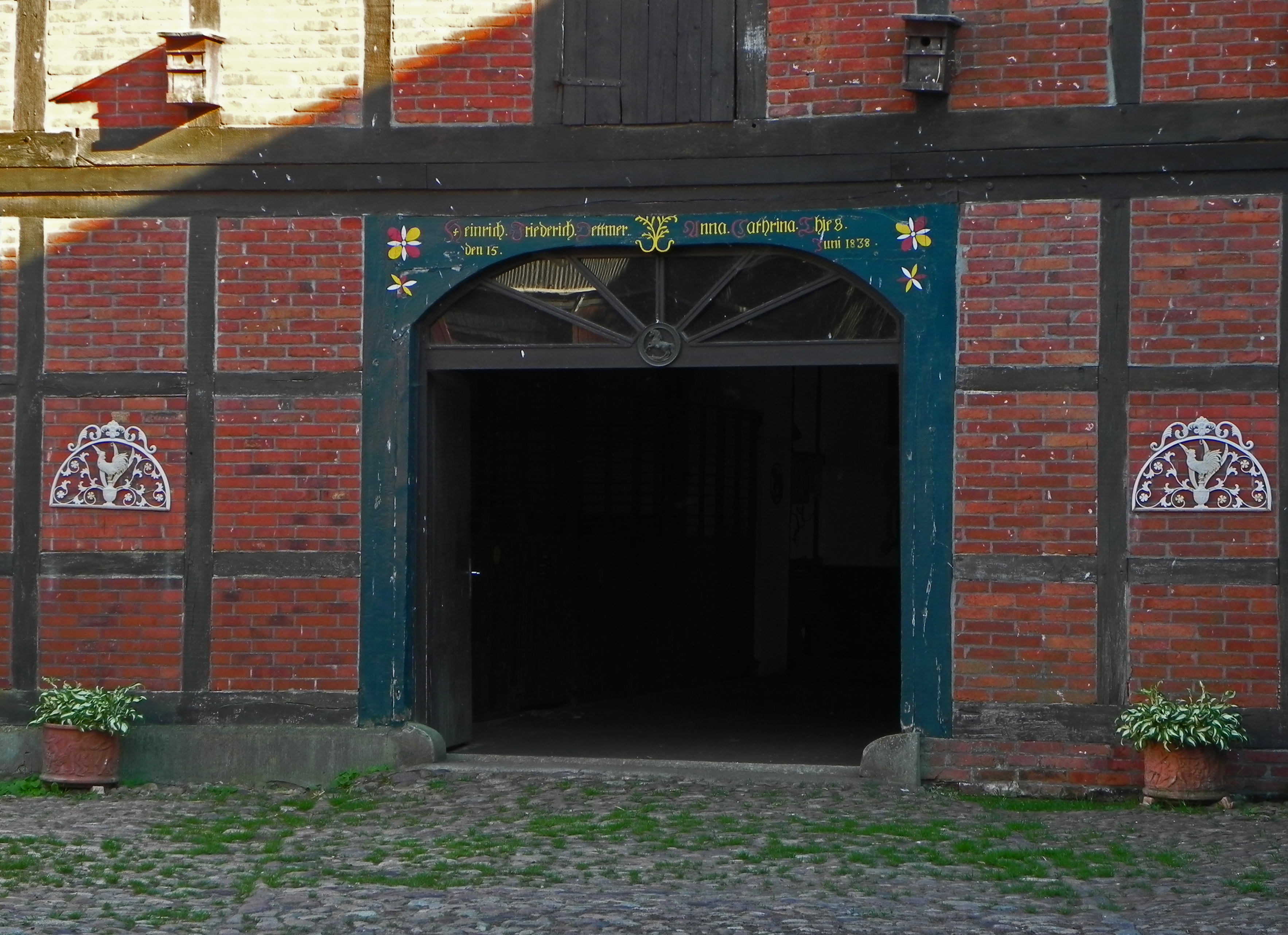 Bauernhof in Wolthausen, Gemeinde Winsen (Aller)